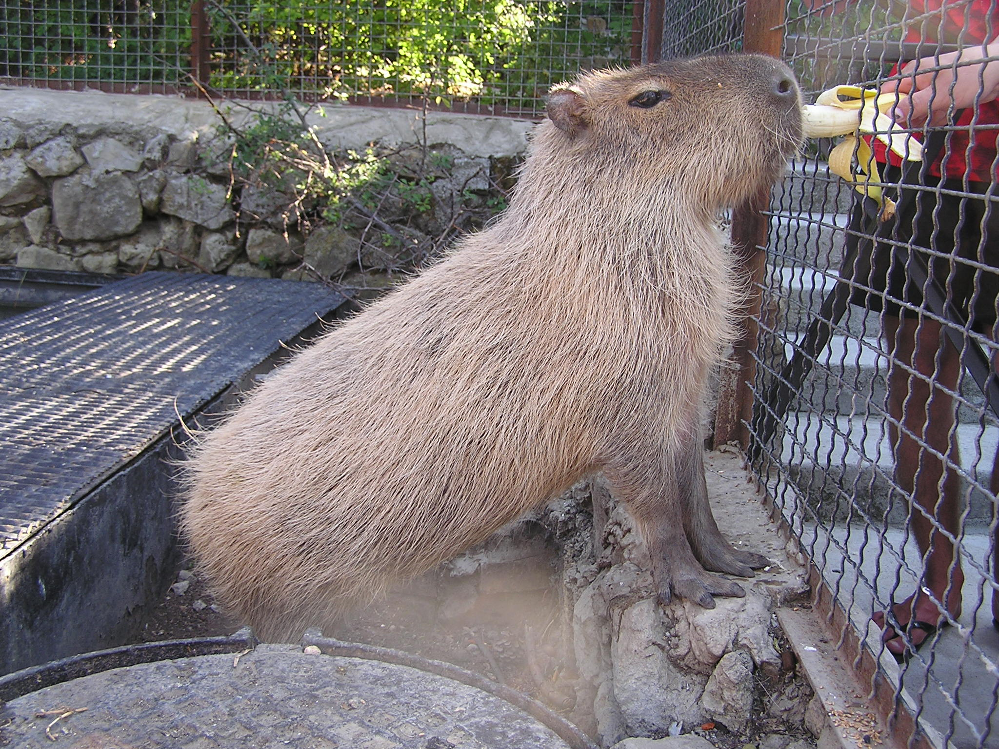 Ялтинский зоопарк. Капибара (Hydrochoerus hydrochaeris)